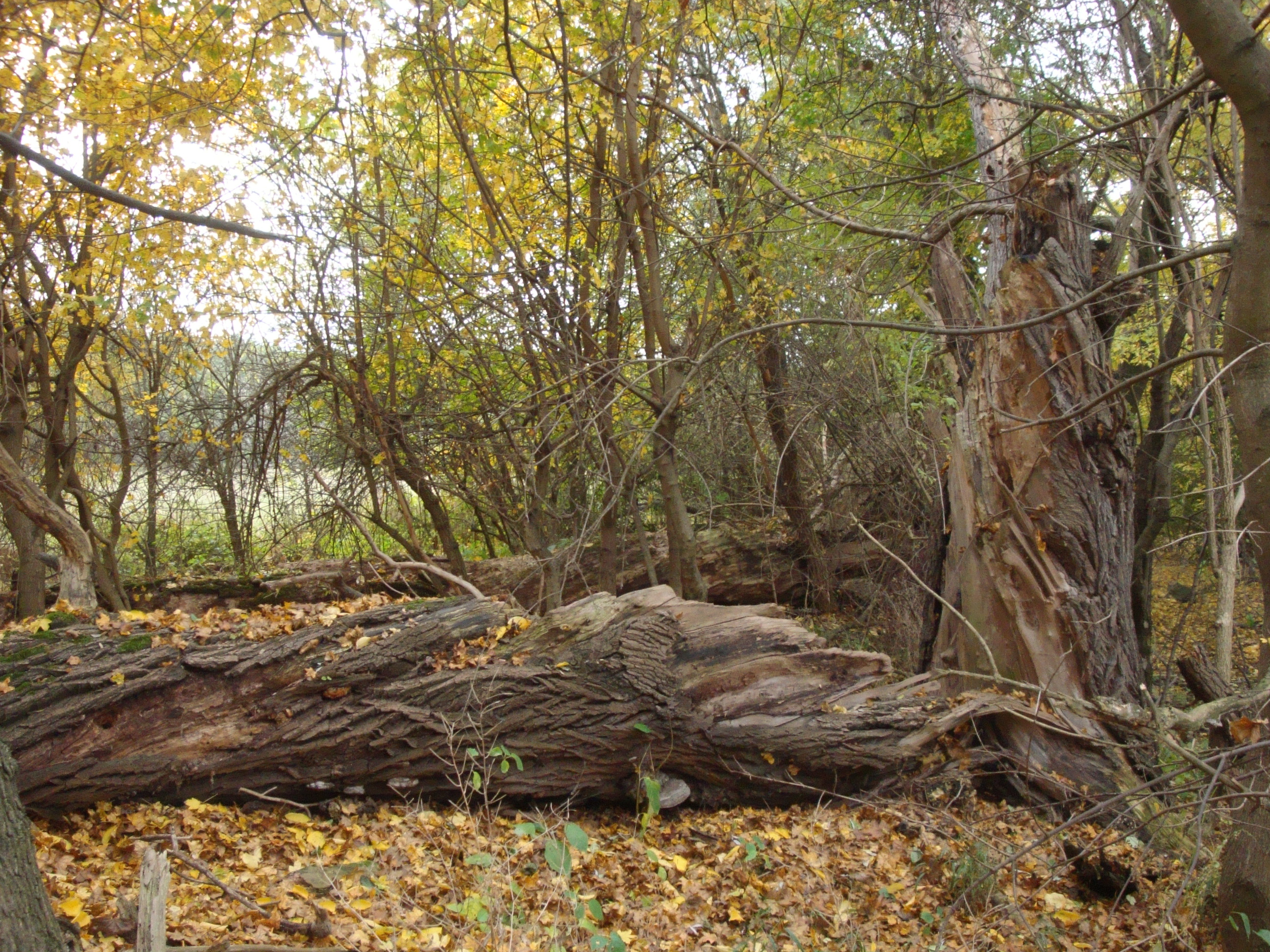 Spadlý kmen vrby bílé na břehu Rájecké tůně, foceno v říjnu 2016